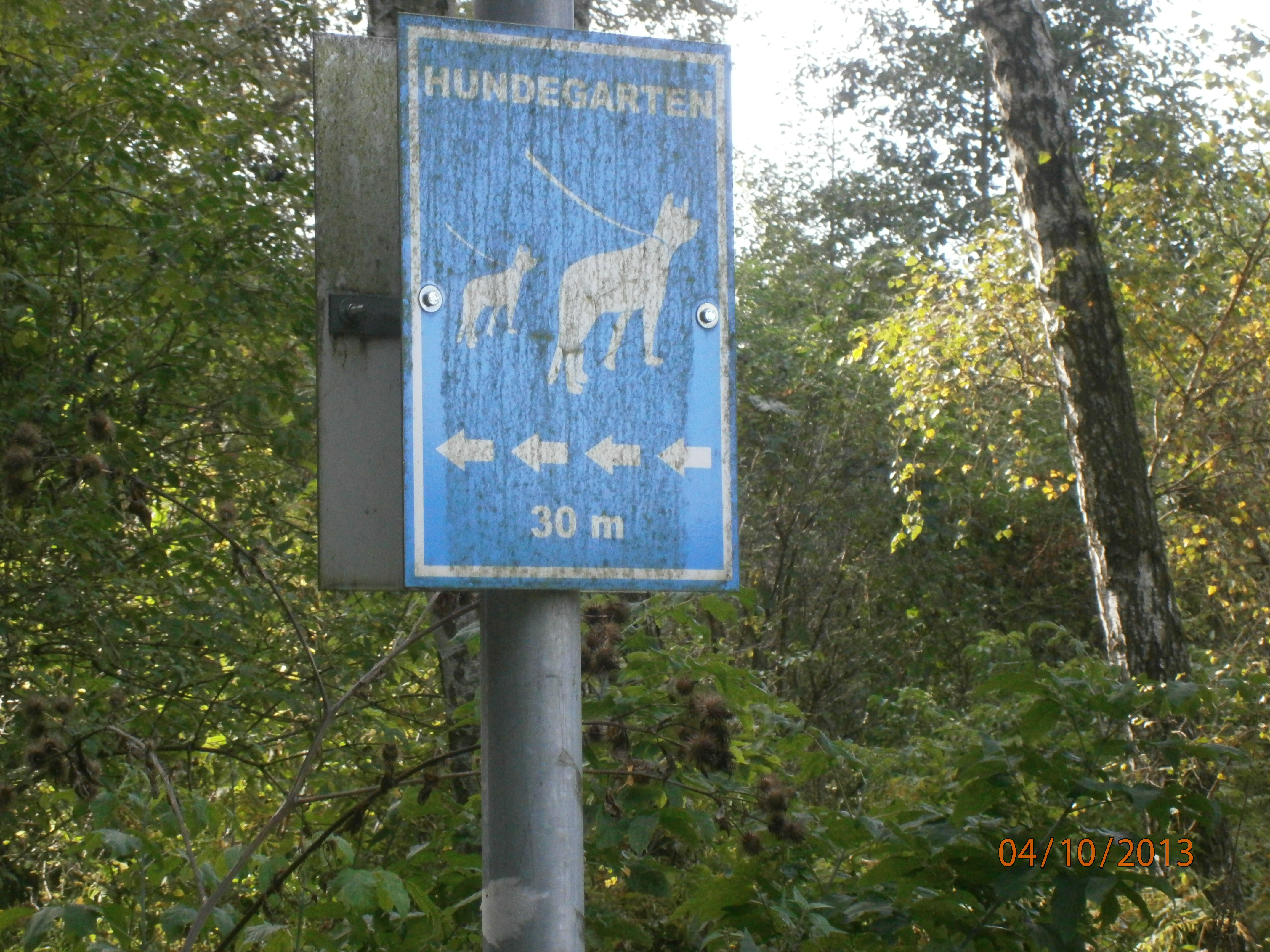 Am Freibad ist eine Straße in Berlin-Lübars. Hier das Schild zum Hundegarten vom Barnimer Dörferweg.